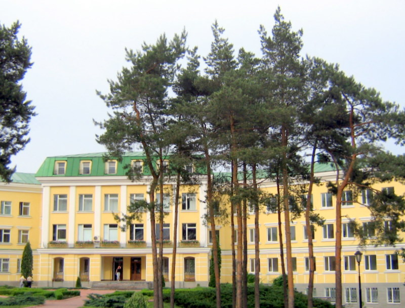 Помещения научно-исследовательской лаборатории.